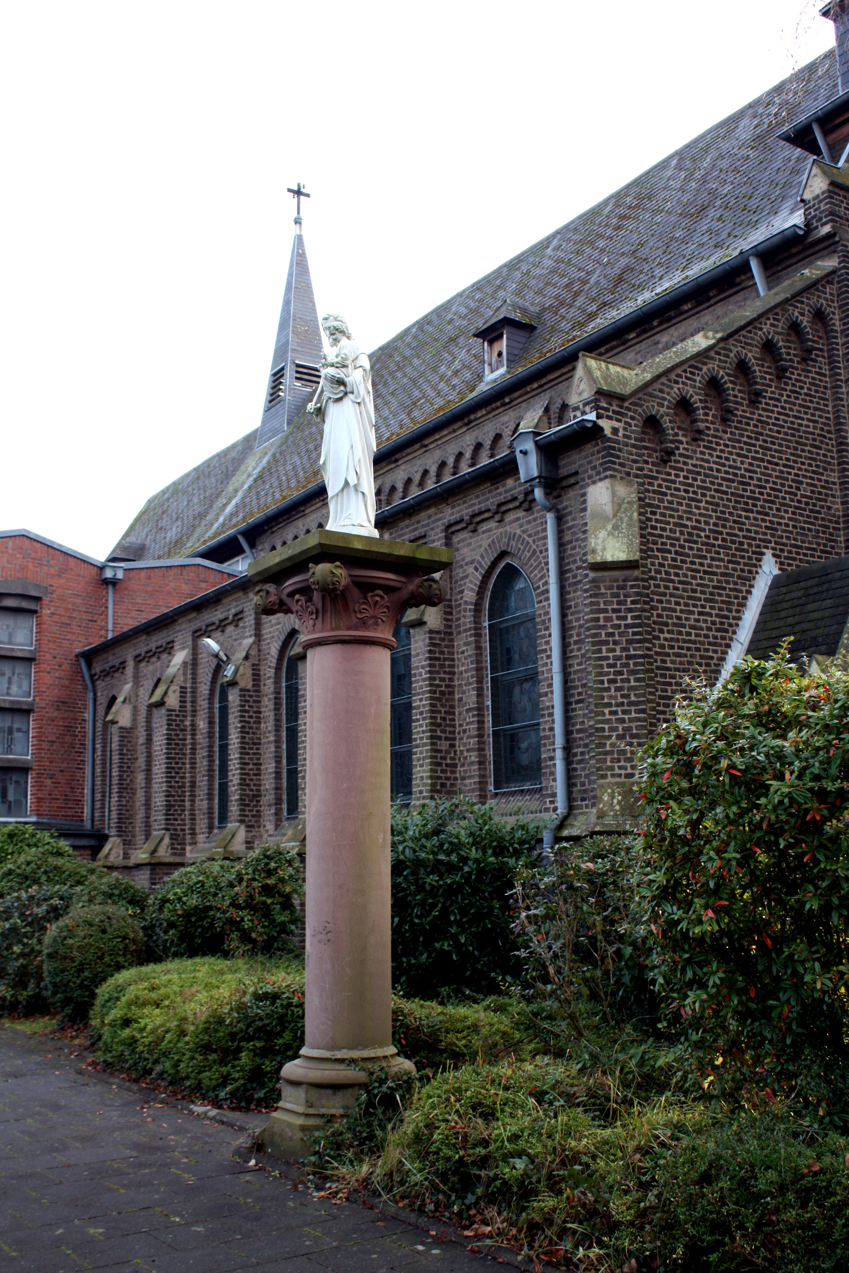 Hürth-Fischenich, Josefssäule vor St. Martin. Die Statue entstammt dem ehemaligen Kloster St. Josef